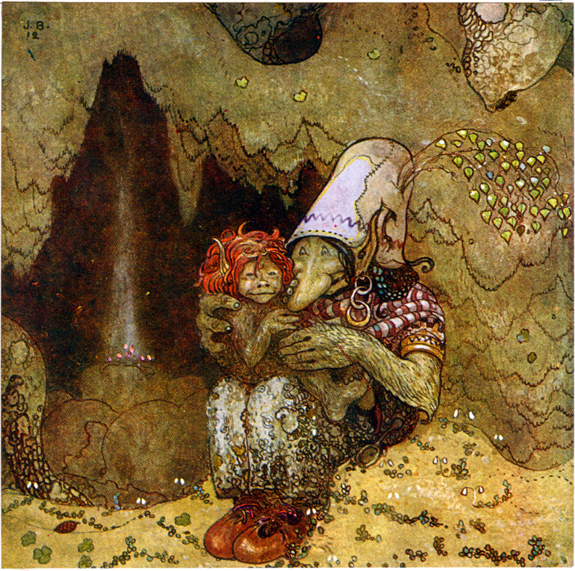 Illustration tirée du conte "Trollsonen som hade solögon och vart skogsman" de Vilhälm Nordin, réalisée par John Bauer pour "Bland tomtar och troll" (Parmi les gnomes et les trolls), édition 1912.